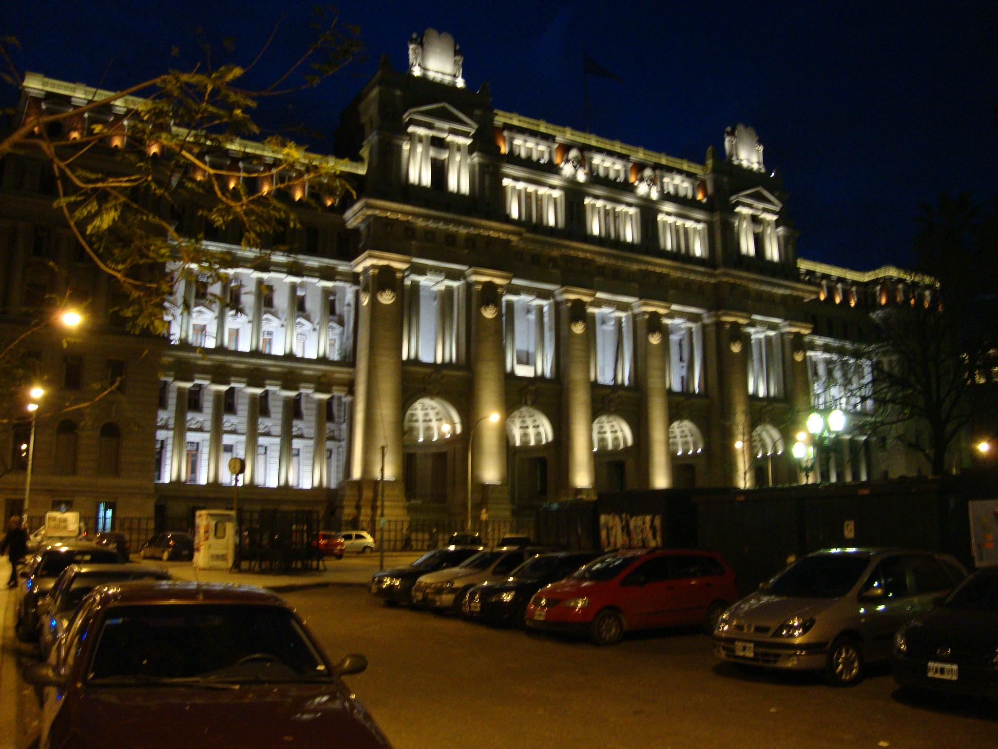 Fachada principal del Palacio de Justicia de la Nación Argentina, en la ciudad de Buenos Aires. Iluminación nocturna instalada con la restauración total del edificio, a lo largo de la década de 2000.